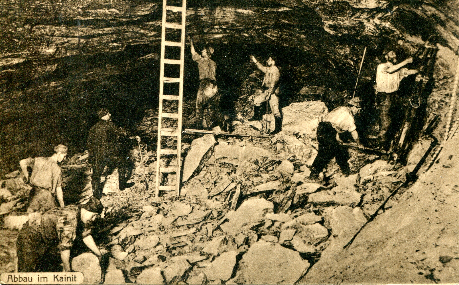 Historische Postkarte, Verlag Gebrüder Schenker, Staßfurt. Fotografie von Abbauarbeiten im sogenannten Kainithut von Staßfurt.